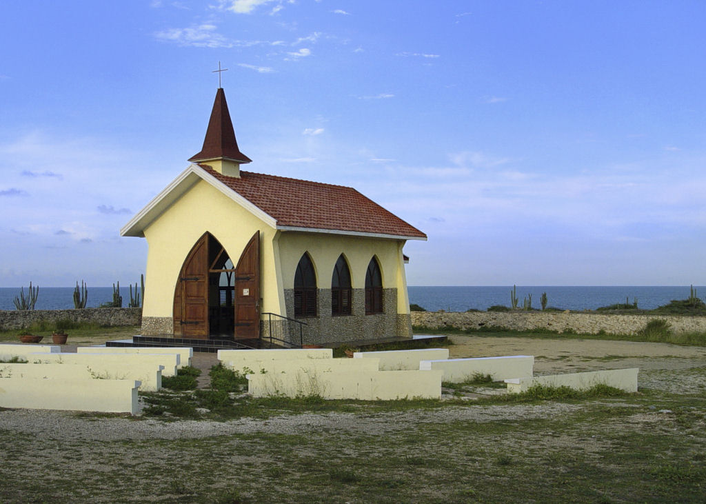 Aruba - AltoVista Chapel